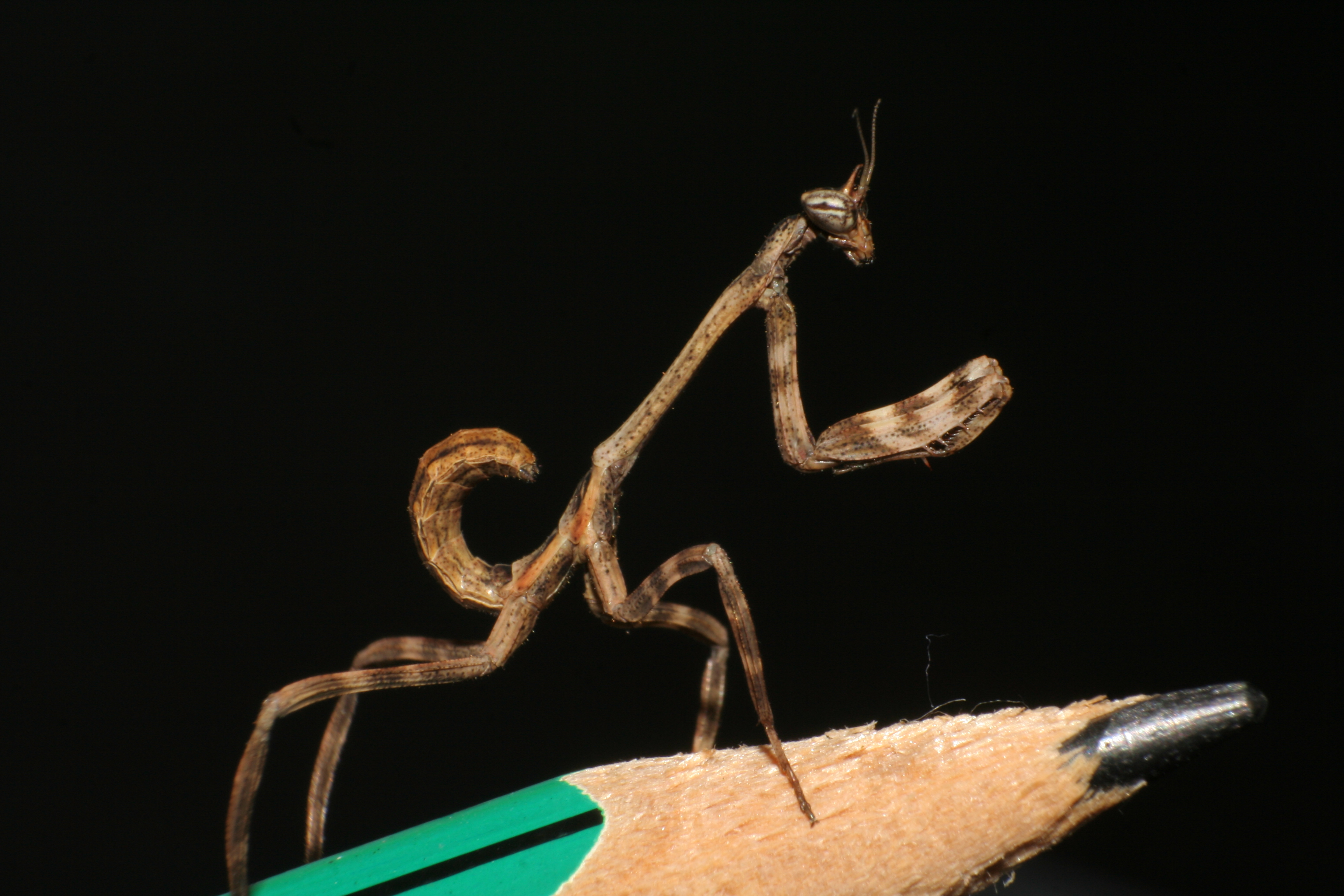 Phyllovates chlorophaea